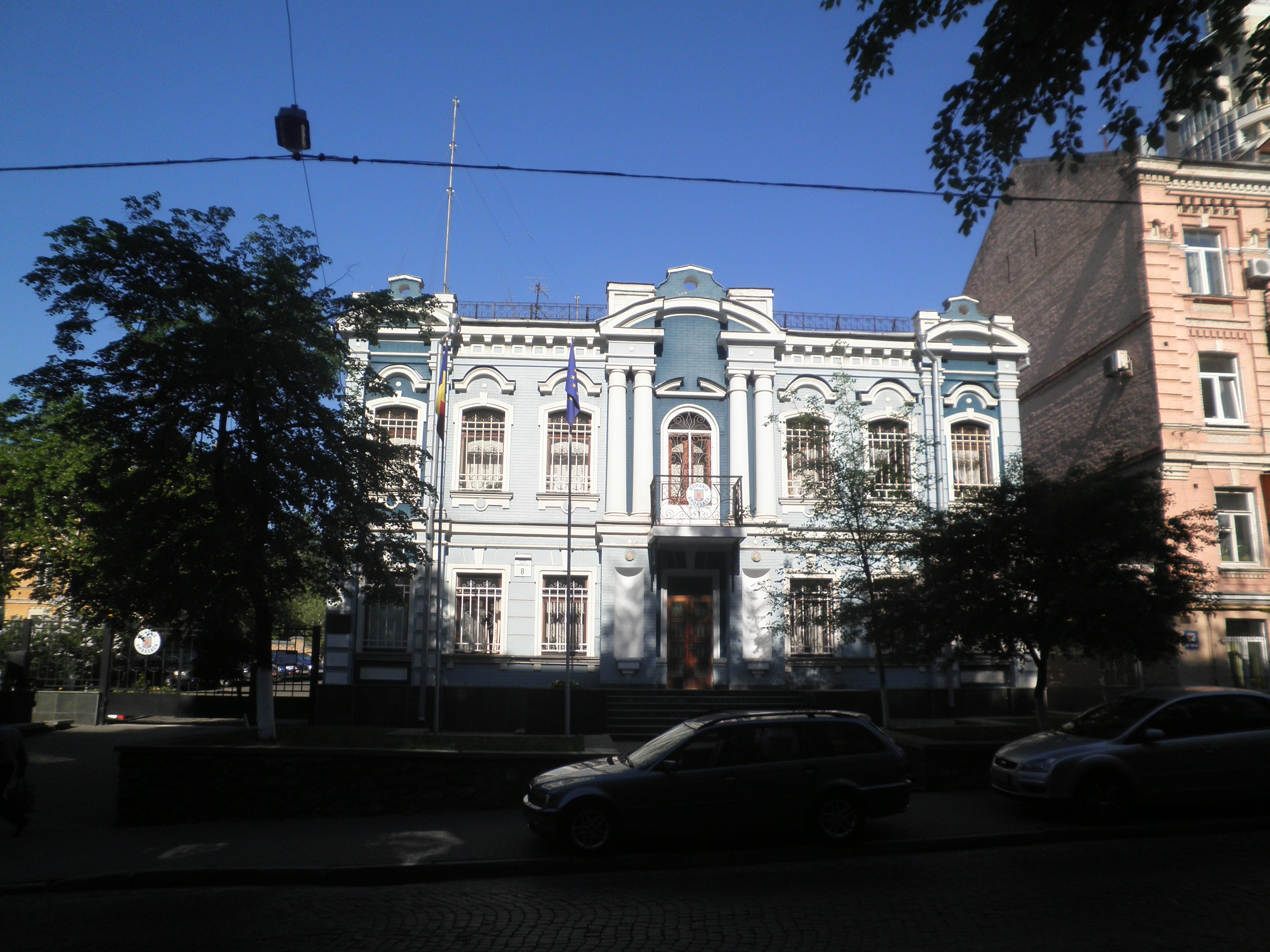 Посольство Румунії в Києві